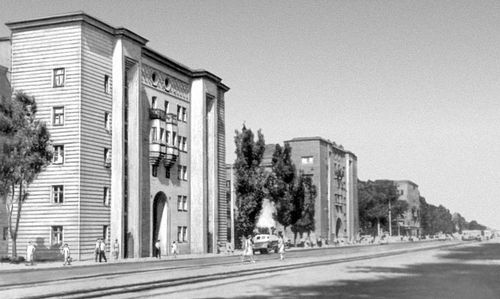 Жилые дома на проспекте Ленина. 1936. Архитектор В. А. Лавров.